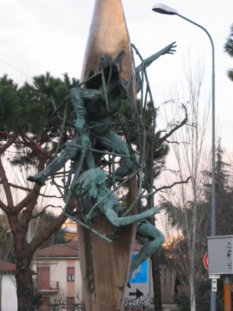 Monumento dell'AVIS